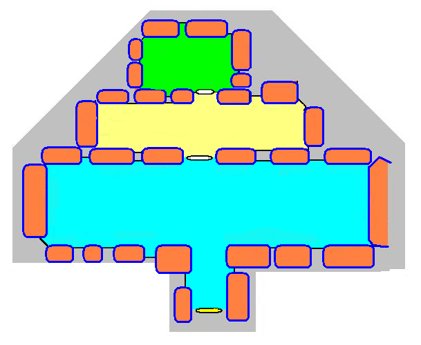 Visihöj